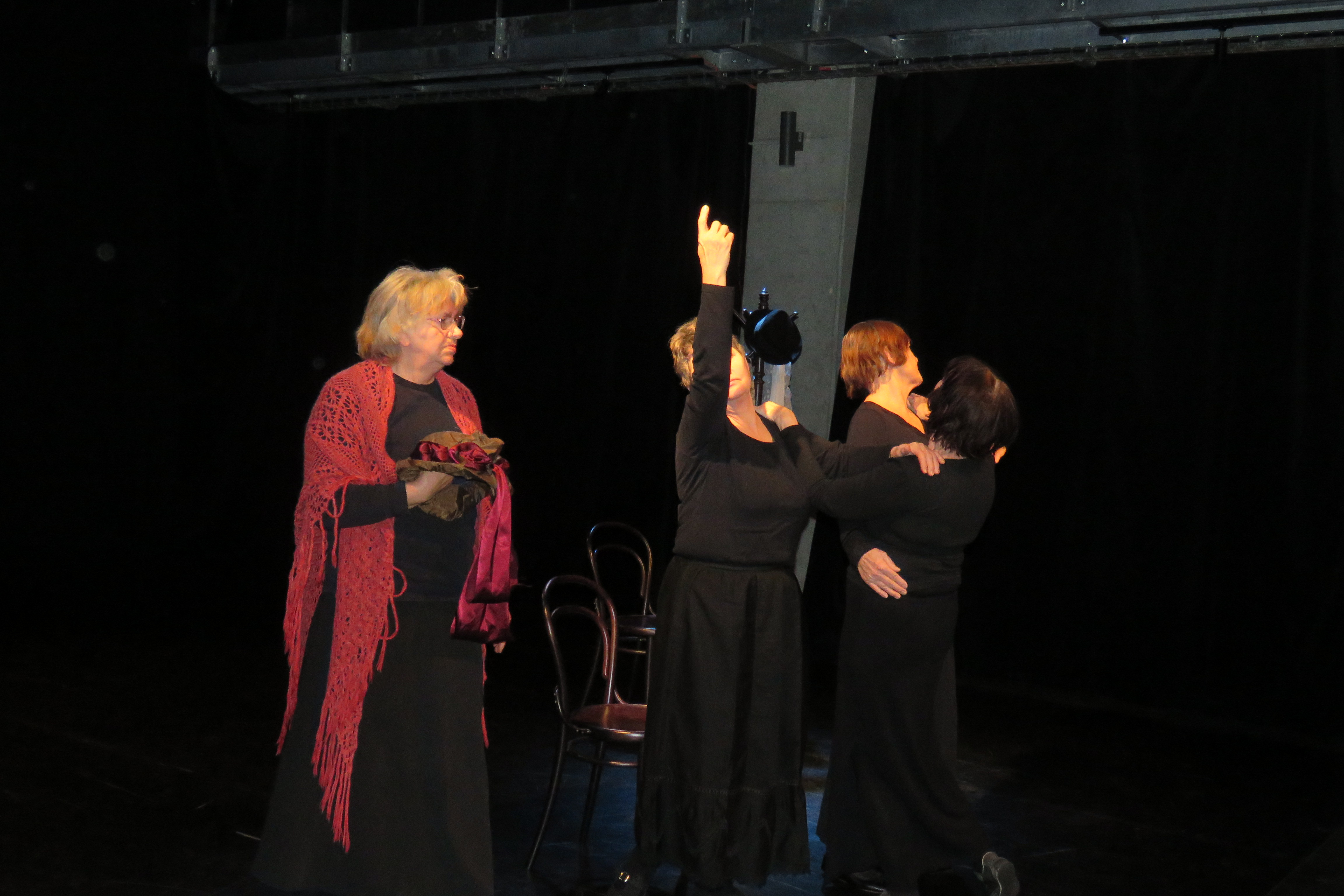 Autorská divadelní hra Ženy, která zobrazuje osudy čtyř žen z naší historie - Perchty z Rožmberka, Mileny Jesenské, Emy Destinnové a Kamily Schönfeldové Zemanové.